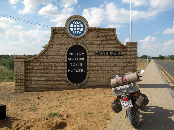 Hotazel gate